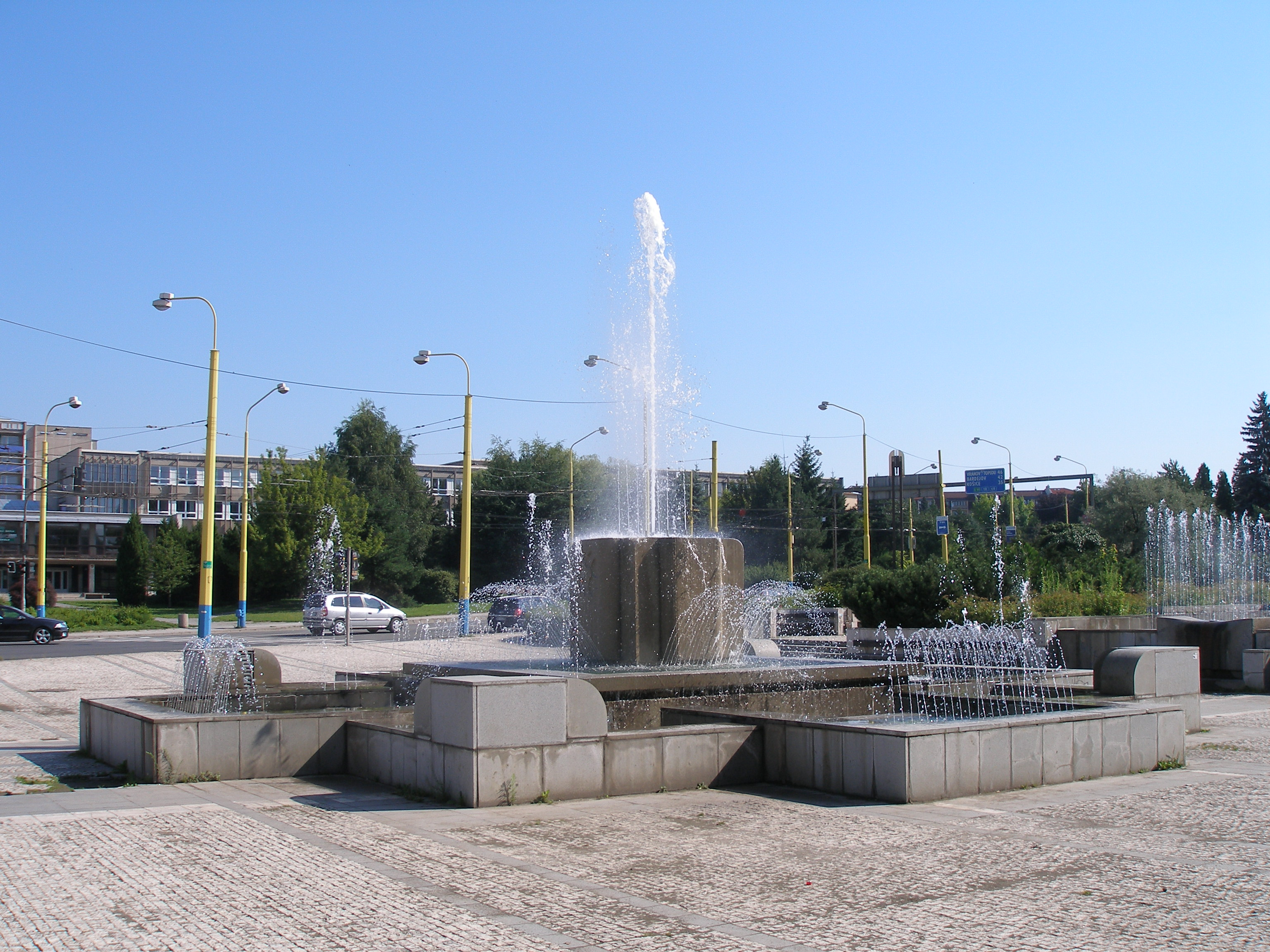 Fontána na Námestí Mieru, Prešov.